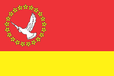 Прапор Новомиргородського району